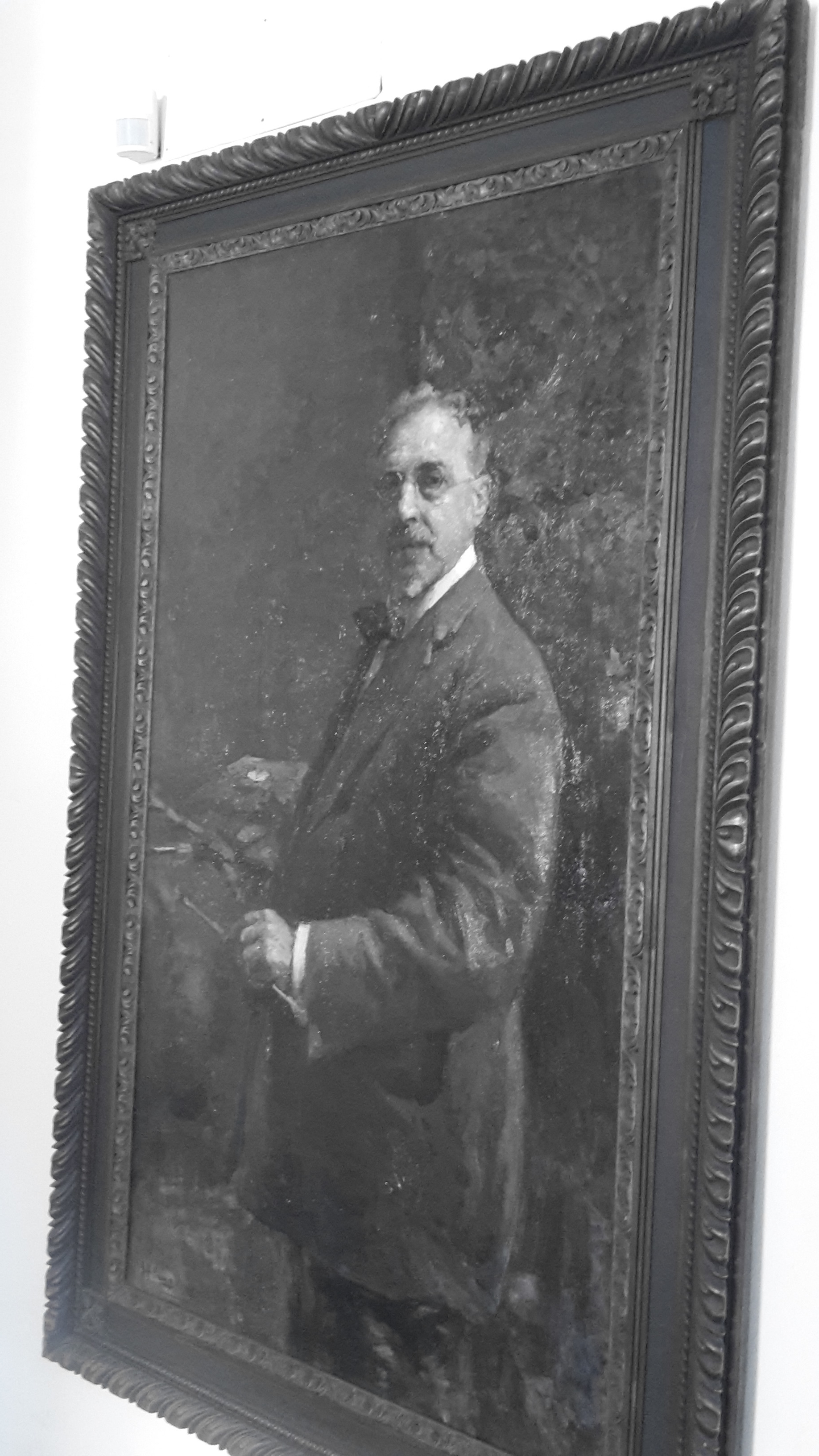 Foto in bianco e nero di un autoritratto di G.F. Piana, conservato nelle sale del comune di Bordighera.